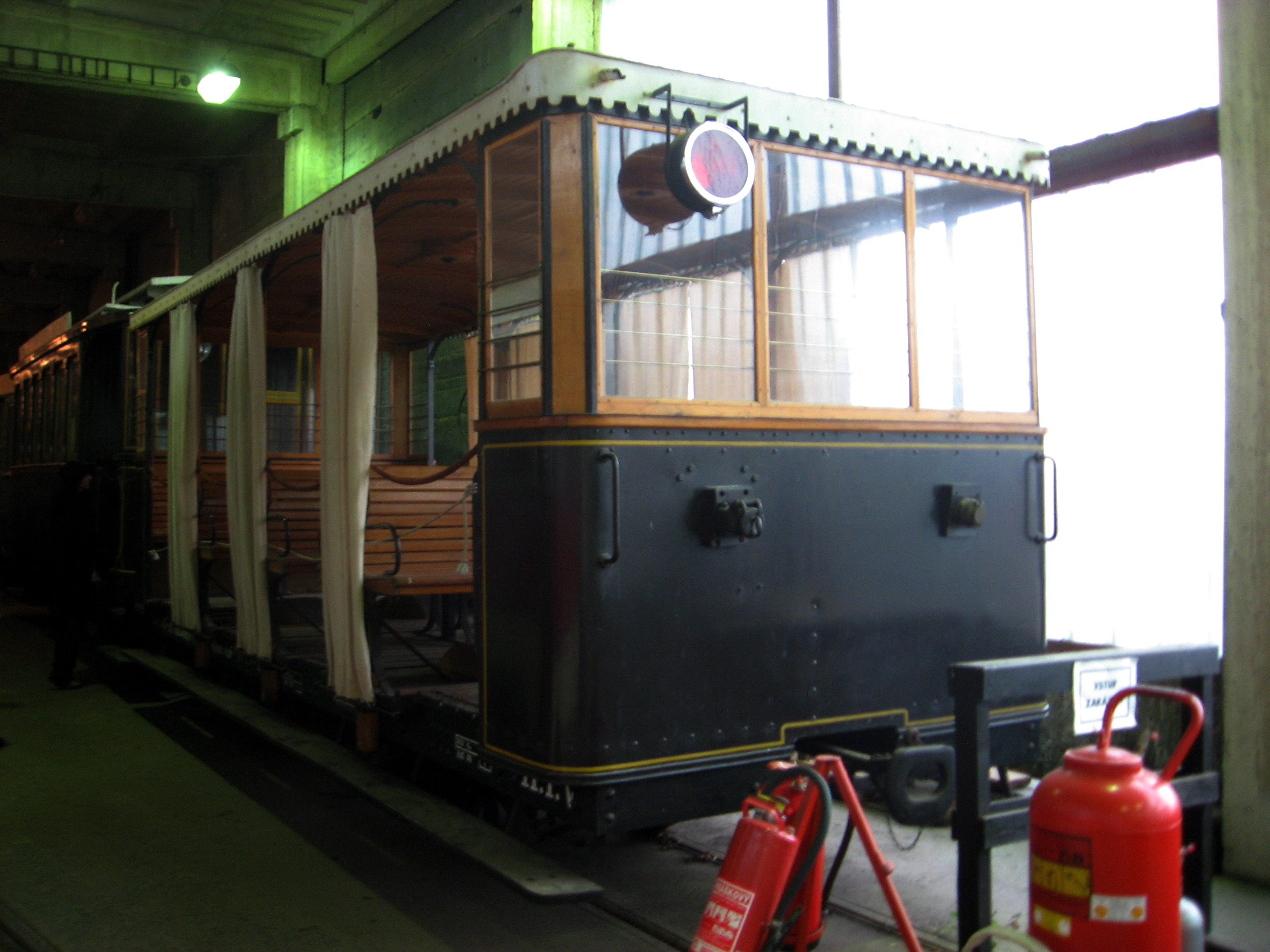 Vlečný vůz z Trenčianské elektrické železnice ev. č. 12 (později ČSD C/u 301), rok výroby 1911, výrobce Ganz – exponát Technického muzea v Brně, depozitář MHD v Líšni